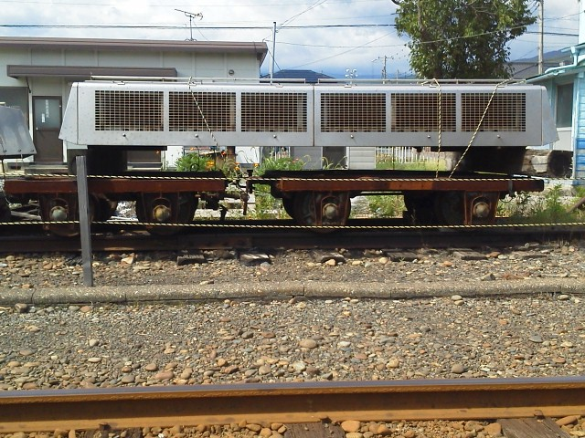 岳南富士岡駅に留置されている旧鉄道連隊の貨車